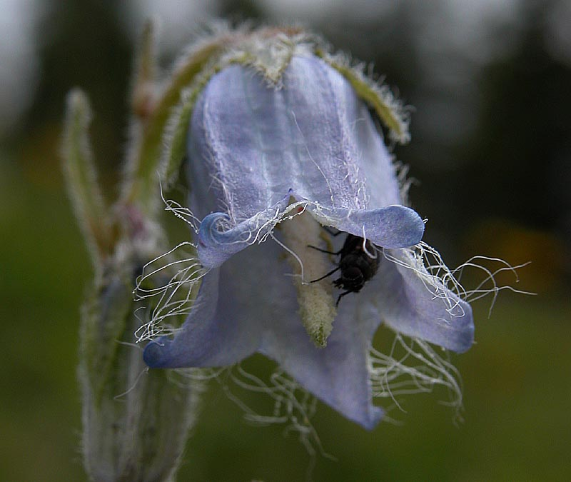 Bärtige Glockenblume (campanula barbata), aufgenommen in der Nähe von Bolsterlang (Allgäuer Alpen)